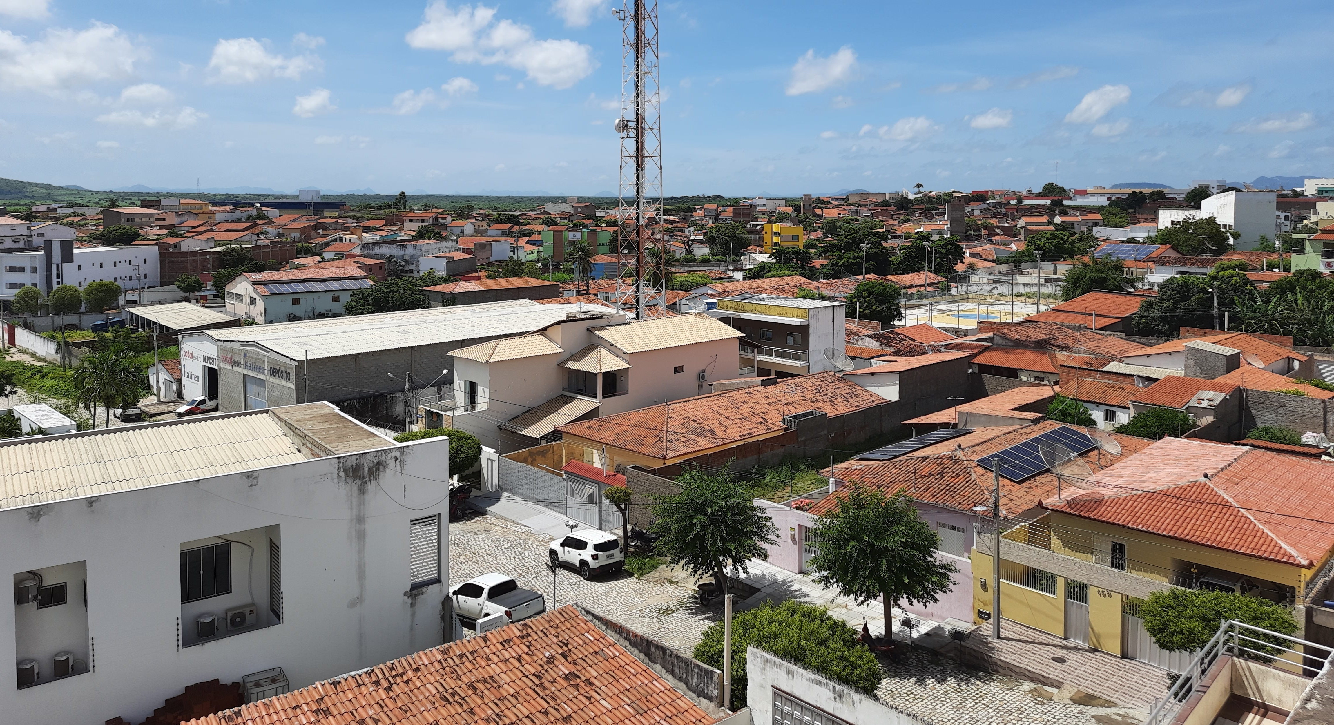 Vista parcial do bairro São Benedito a partir do Hertz Center Hotel, em Pau dos Ferros, Rio Grande do Norte (Brasil).